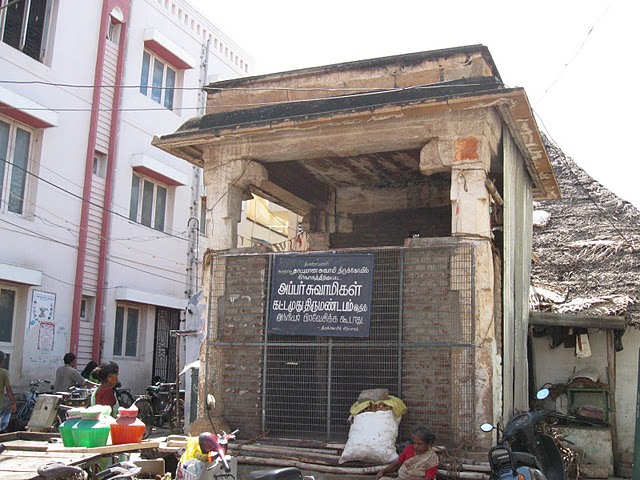 பக்தி இலக்கிய காலத்தின் முன்னோடியாக விளங்கிய திருநாவுக்கரசர் என்னும் அப்பர் சுவாமிகளின் பெயரிலான கட்டமுதுத் திருமண்டபம். இடம் திருச்சி.